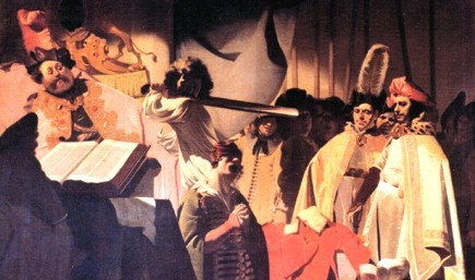 Kunstcollectie Stadhuis Hasselt(Ov.)